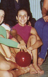 África Blesa con la selección nacional de gimnasia rítmica en 1975.